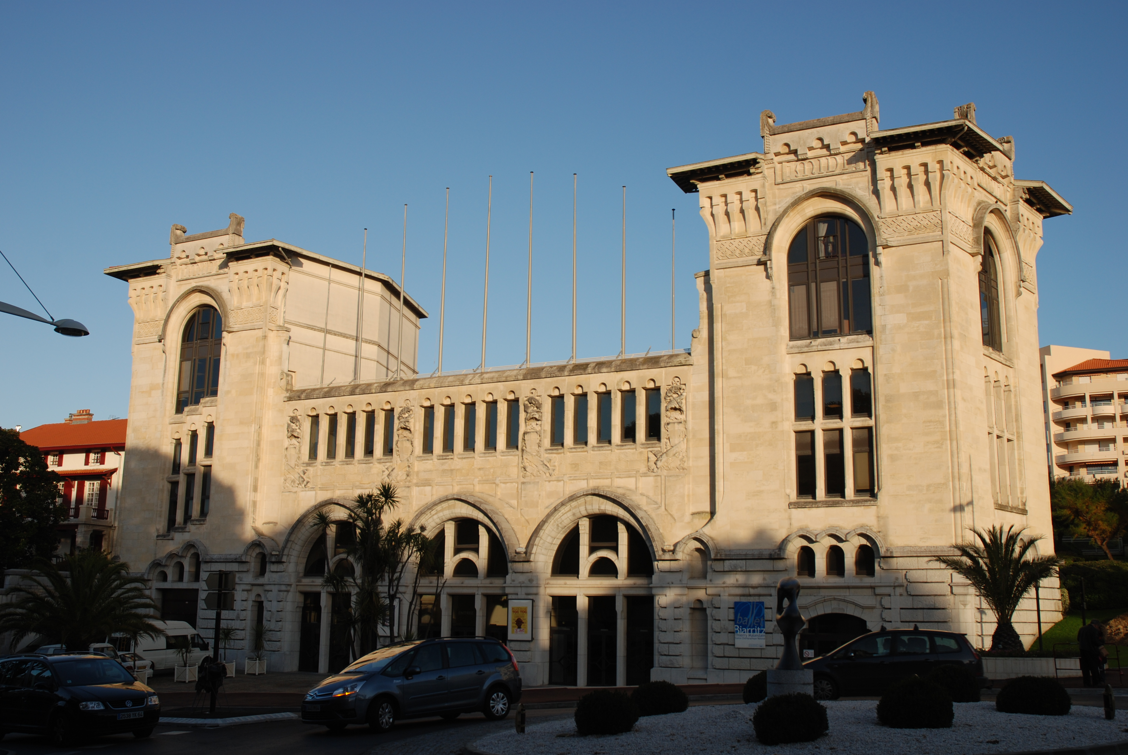 Biarritz, l'ancienne gare du Midi, aujourd'hui centre culturel